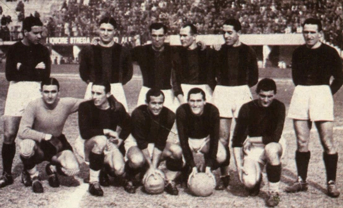 Una formazione del Bologna nella stagione 1938-39. Da sinistra, in piedi: F. Fedullo, B. Maini, R. Sansone, A. Biavati, M. Pagotto, G. Corsi; accosciati: P. Ferrari, C. Reguzzoni, M. Andreolo, H. Puricelli, S. Ricci.